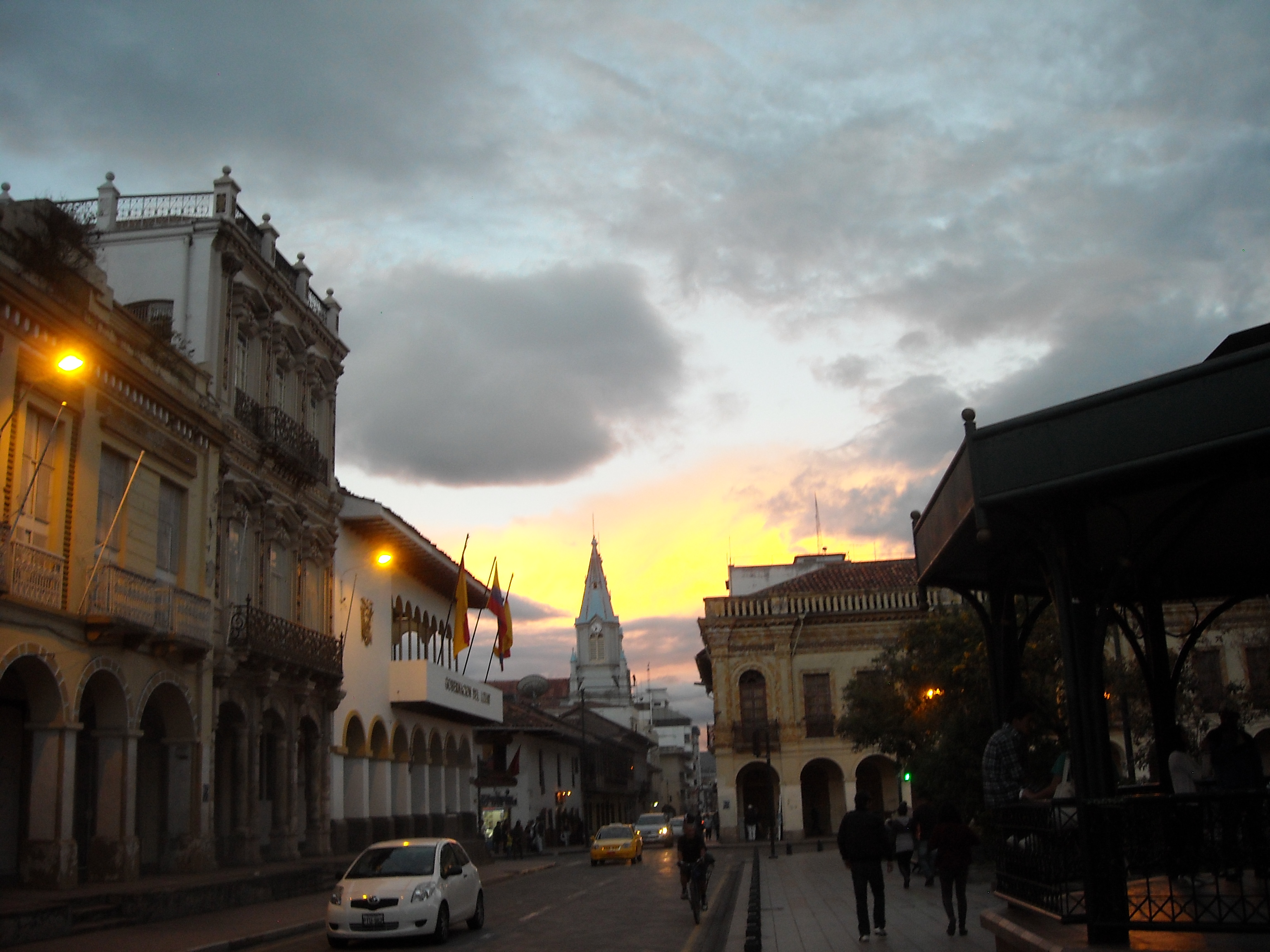 Calles del centro histórico de Cuenca.